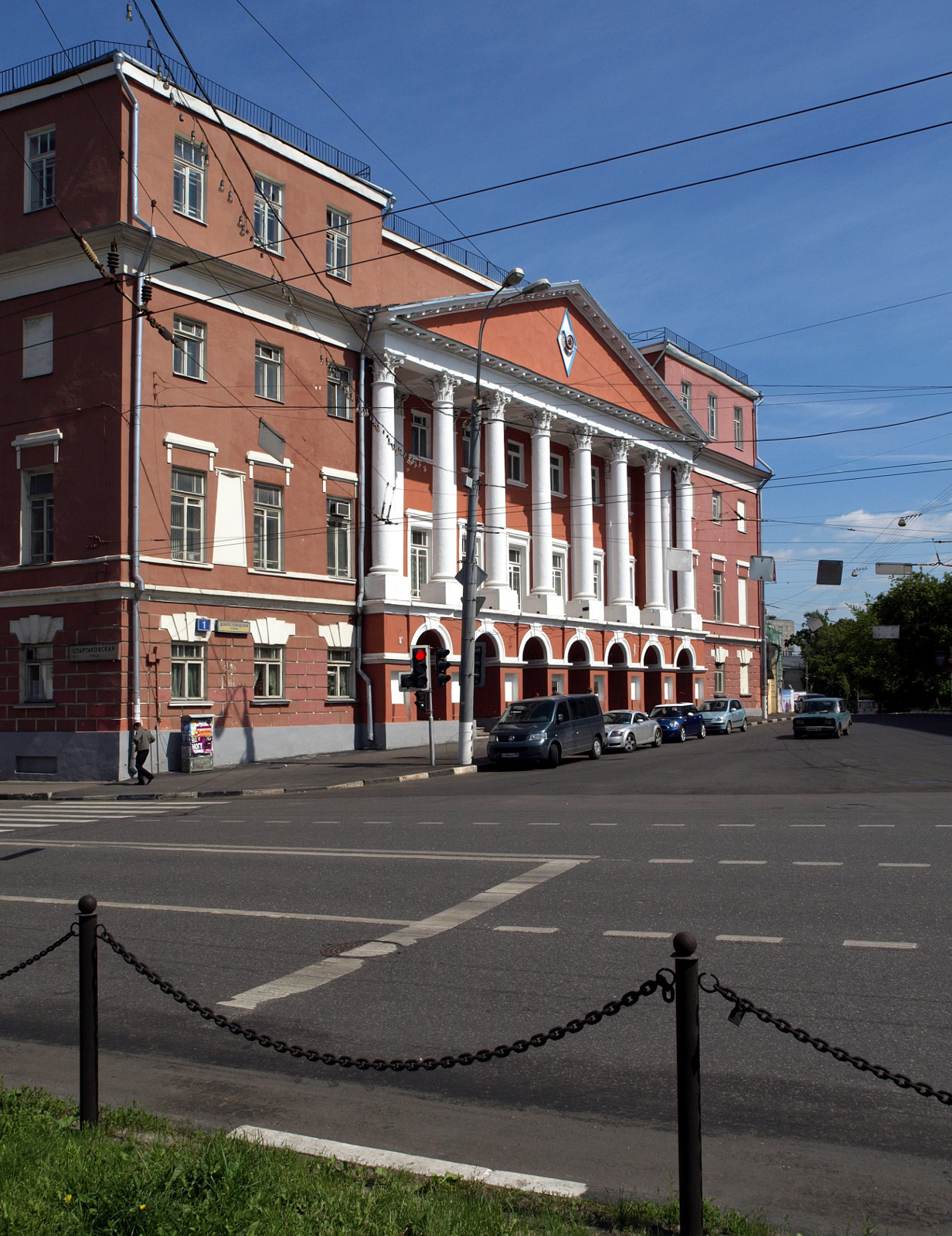 Перестроенный дворец А. И. Мусина-Пушкина на Разгуляе (архитектора М. Казаков)